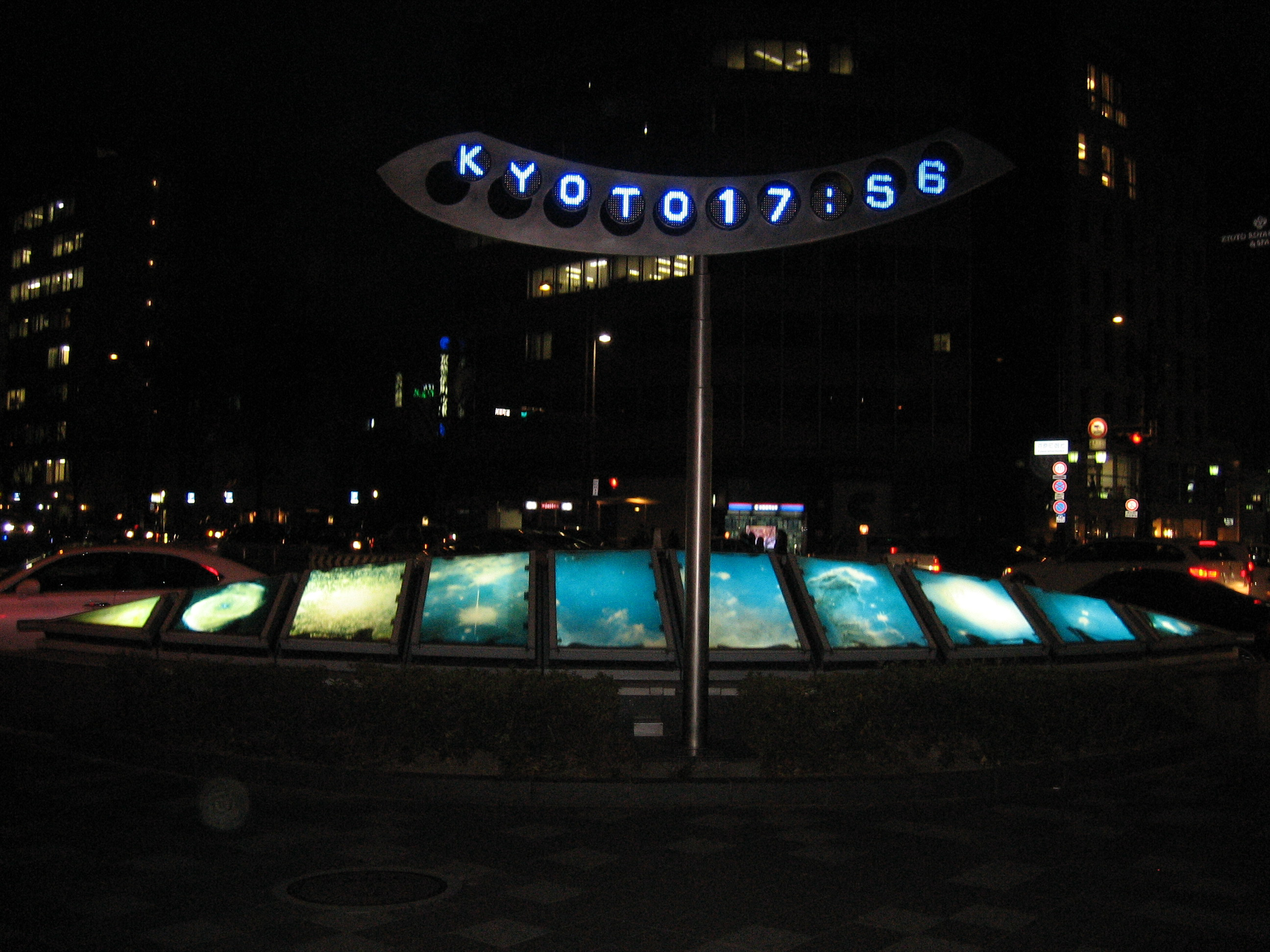 京都市中京区河原町御池交差点から御池通シンボルロード・アート「宇宙の時間」を撮影